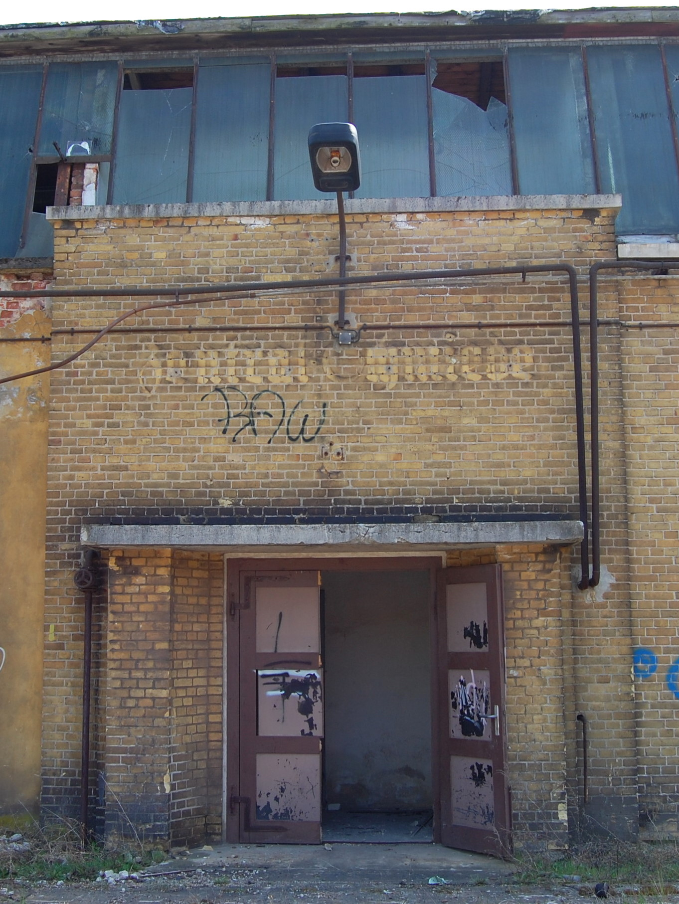 RAW Salbke, Eingang zur Zentralschmiede